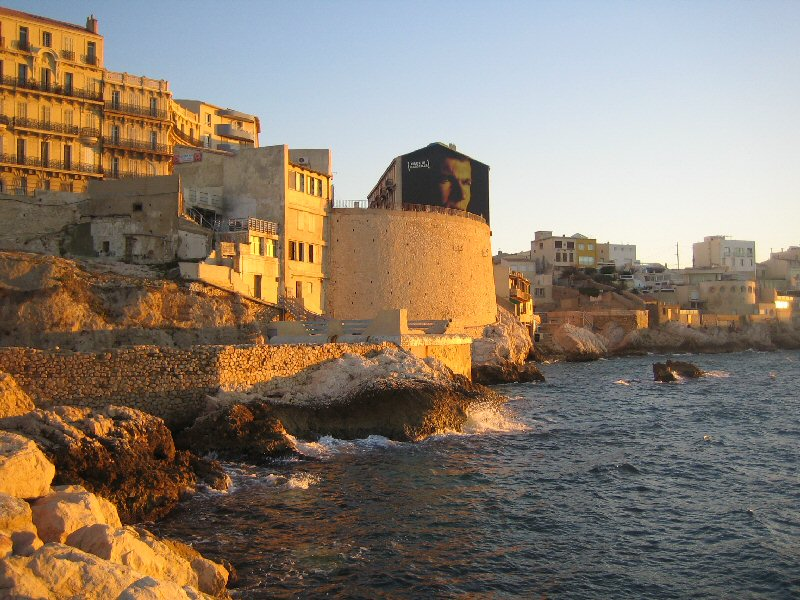 Corniche du Président John Fitzgerald Kennedy, dans le quartier d'Endoume (7e arrondissement) à Marseille, France. Le grand mur décoré par un publiciste (place Paul Ricard, au sud du Vallon des Auffes) célèbre le sport et les personnalités de Marseille, avec ici le footballeur Zinedine Zidane (affiché de 1998 à 2006).